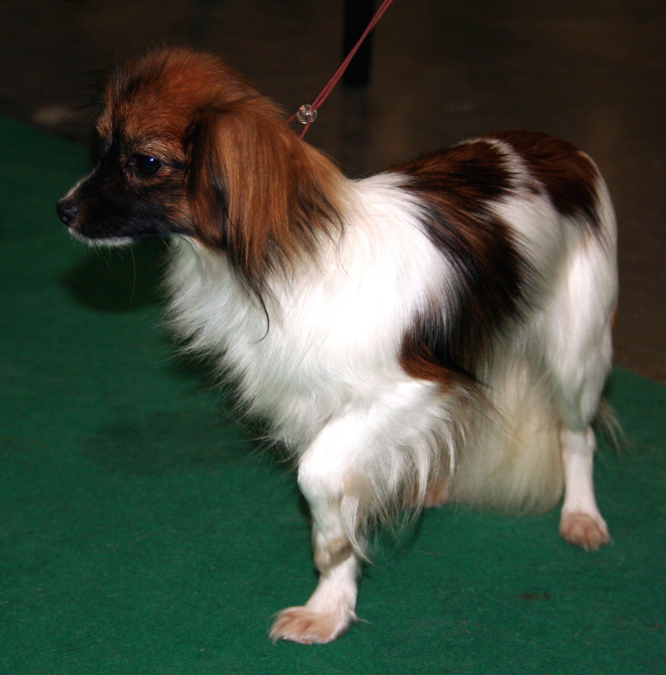 Spaniel_miniaturowy_kontynentalny_phalene na Światowej Wystawie Psów Rasowych w Poznaniu